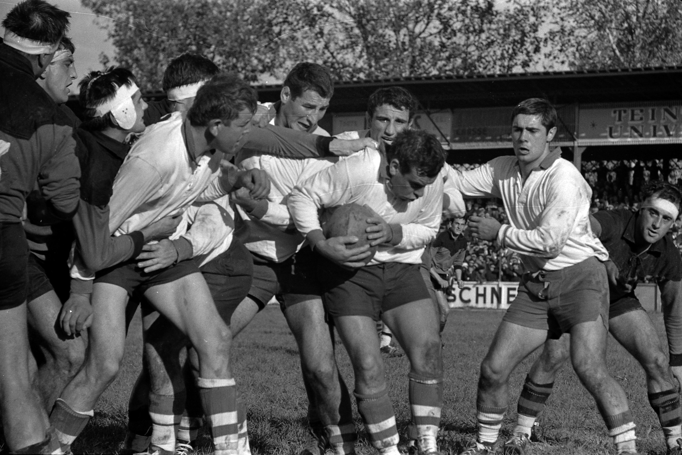 Stade Ernest Wallon. Le 14 Novembre 1965. Vue d'une phase de jeu entre le Stade Toulousain et Agen.